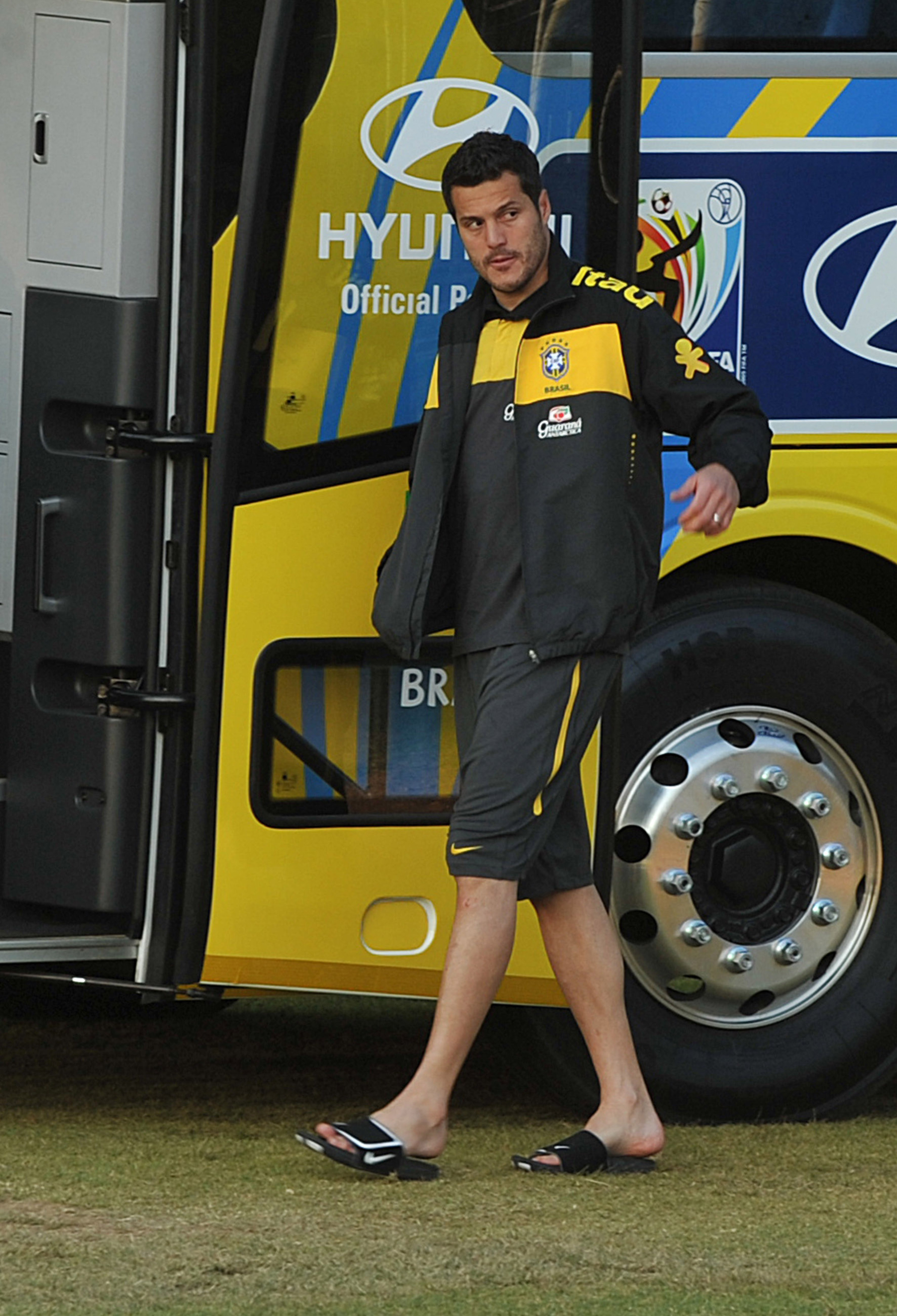 Joanesburgo (África do Sul) - O goleiro da Seleção Brasileira, Júlio Cesar, deixa o campo de treino na Randburg High School.